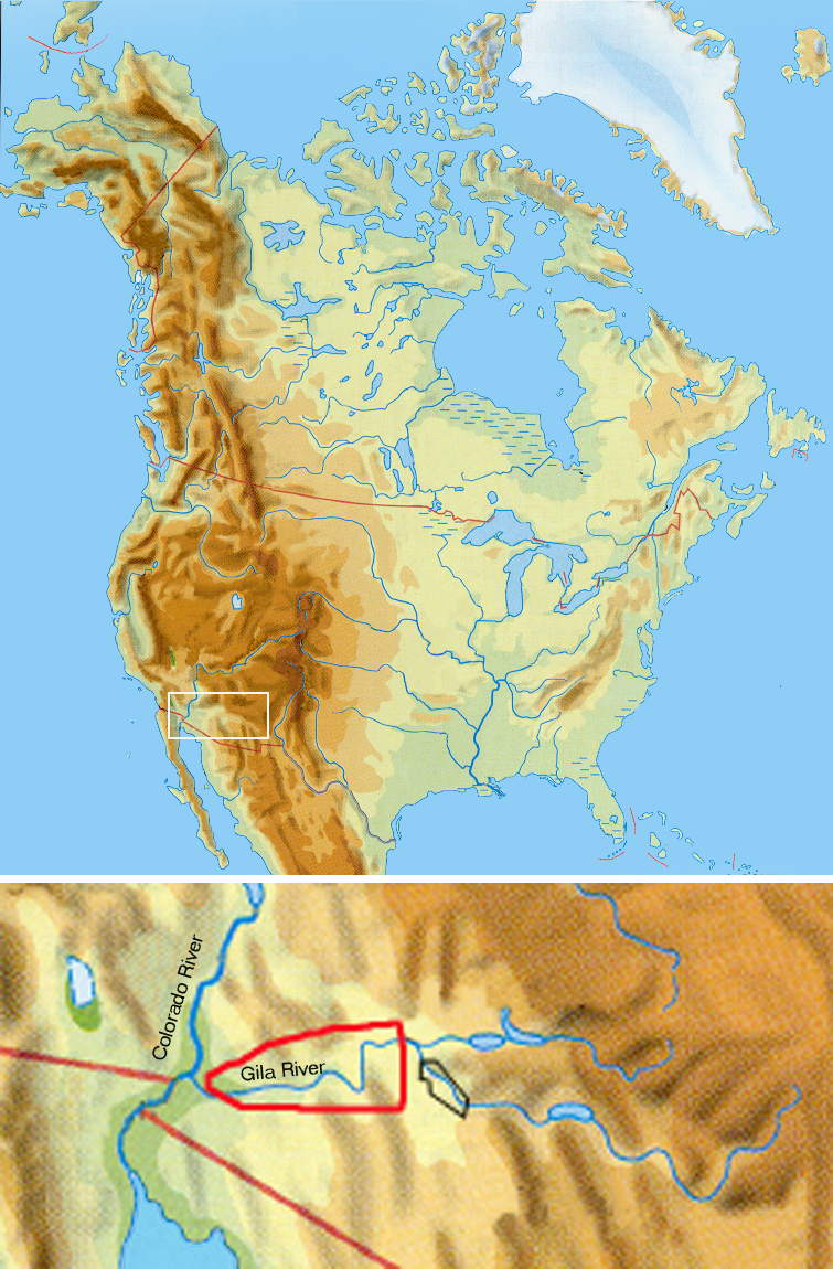 Wohngebiete der Maricopa